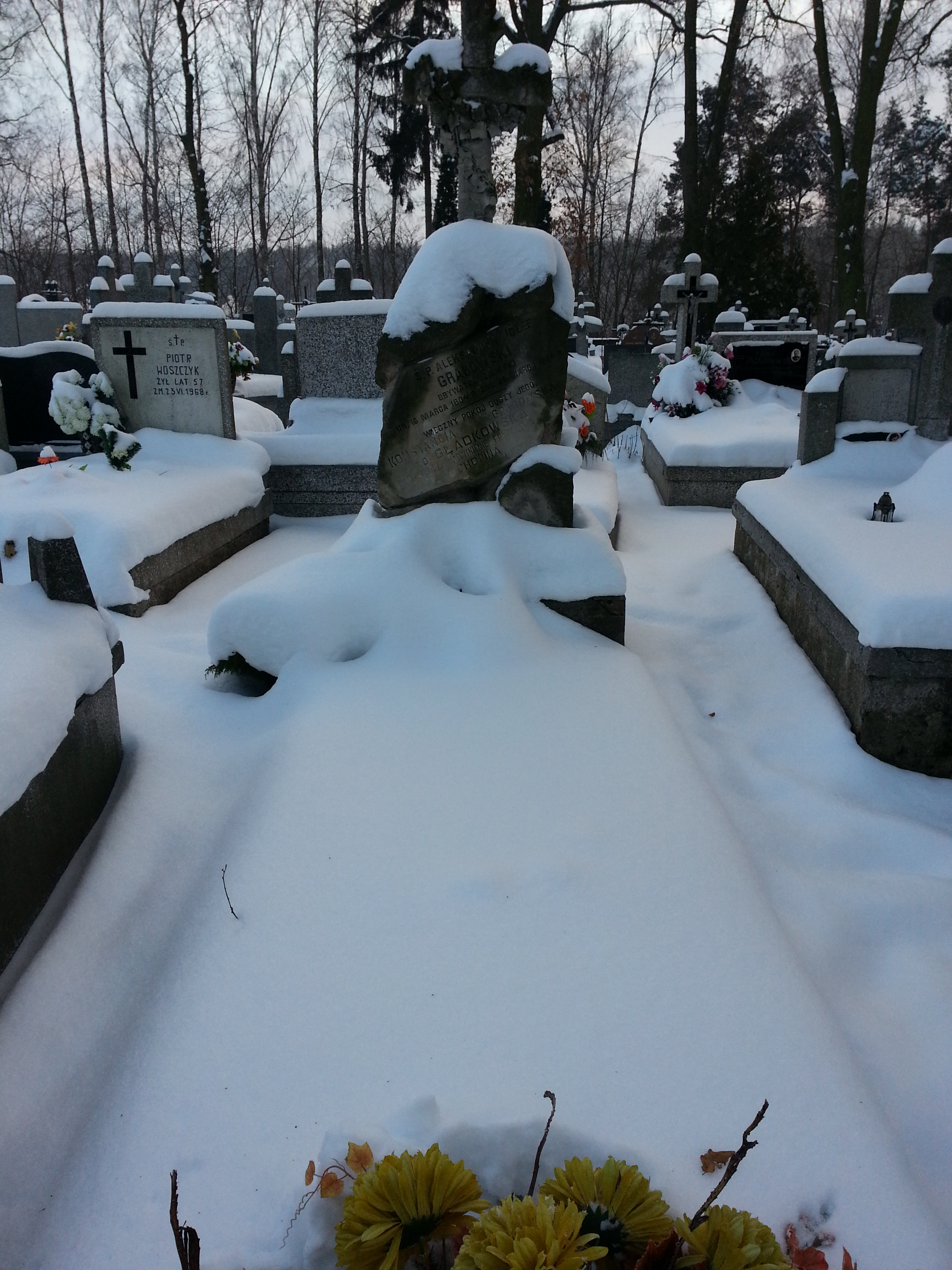 Babsk - cmentarz rzymskokatolicki, 1 poł. XIX, XX w., grób Konstancji Gładkowskiej